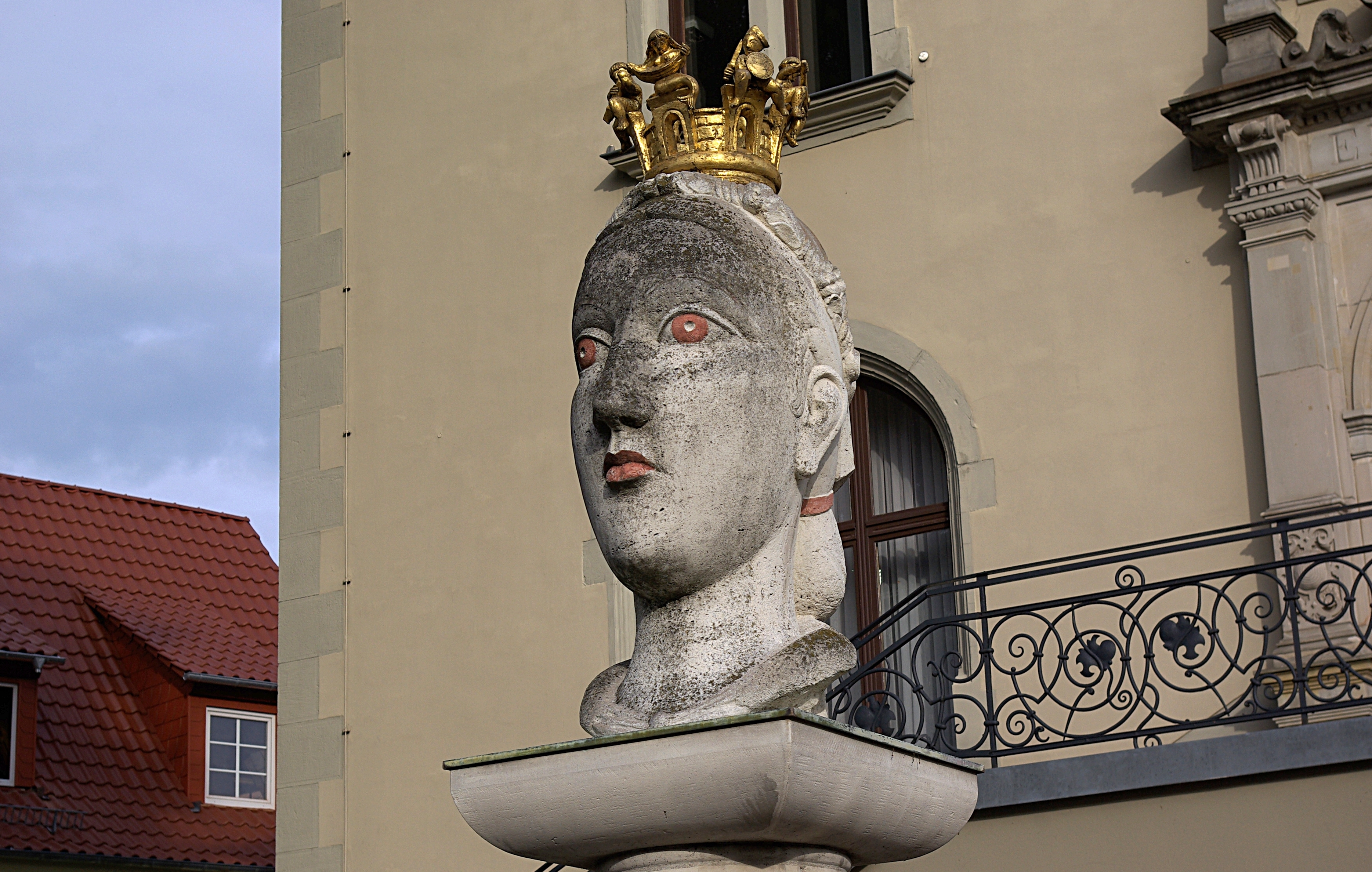 Möckern in Sachsen-Anhalt. Die Statue ist 1995 entstanden und steht vor dem Rathaus auf einer Stele.